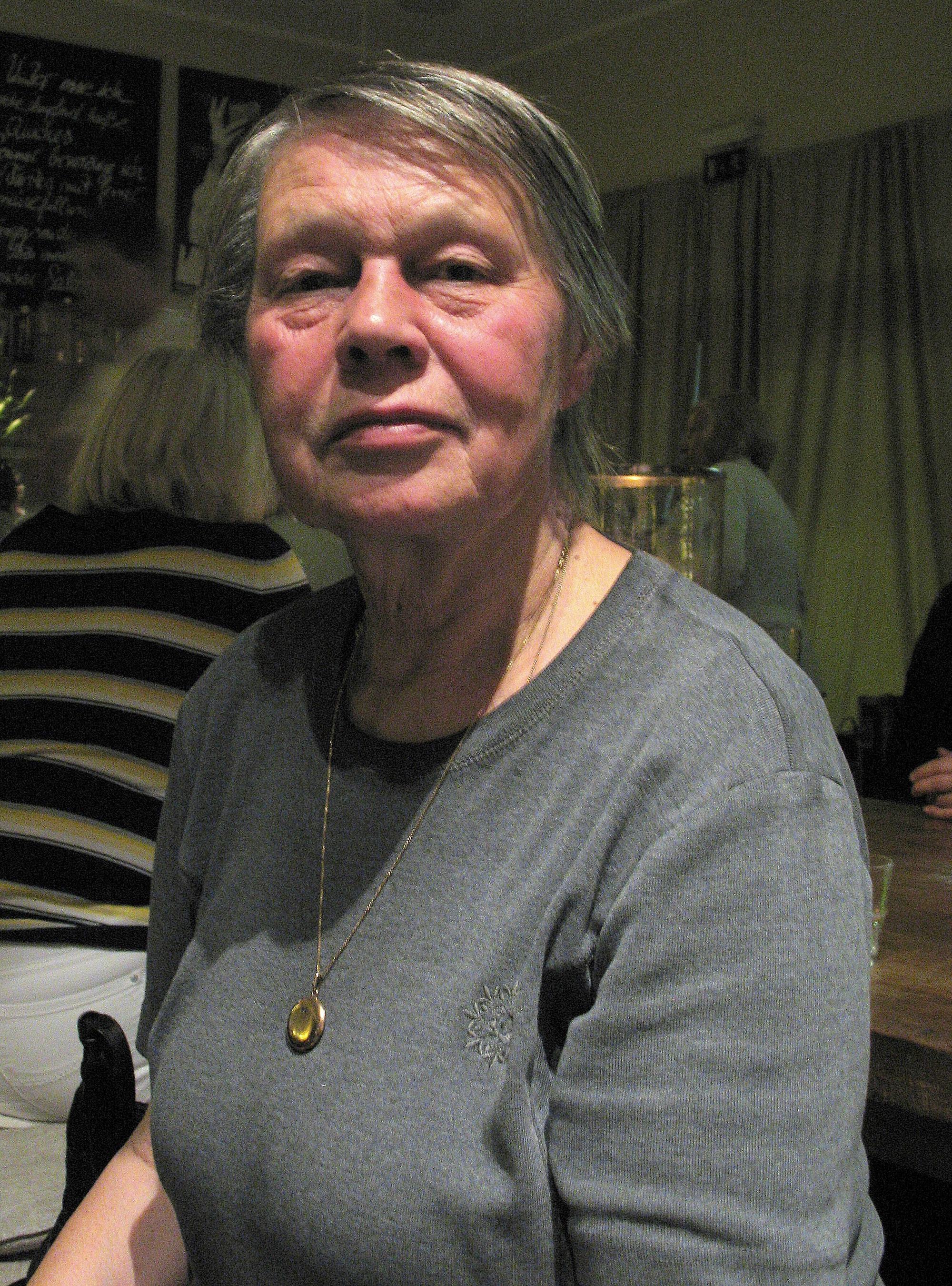 Erika Richter, 07.09.2009